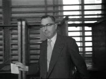 Max Euwe brengt zijn stem uit tijdens de Tweedekamerverkiezingen van 1956